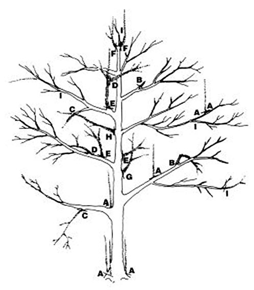 Schema de taille des arbres fruitiers